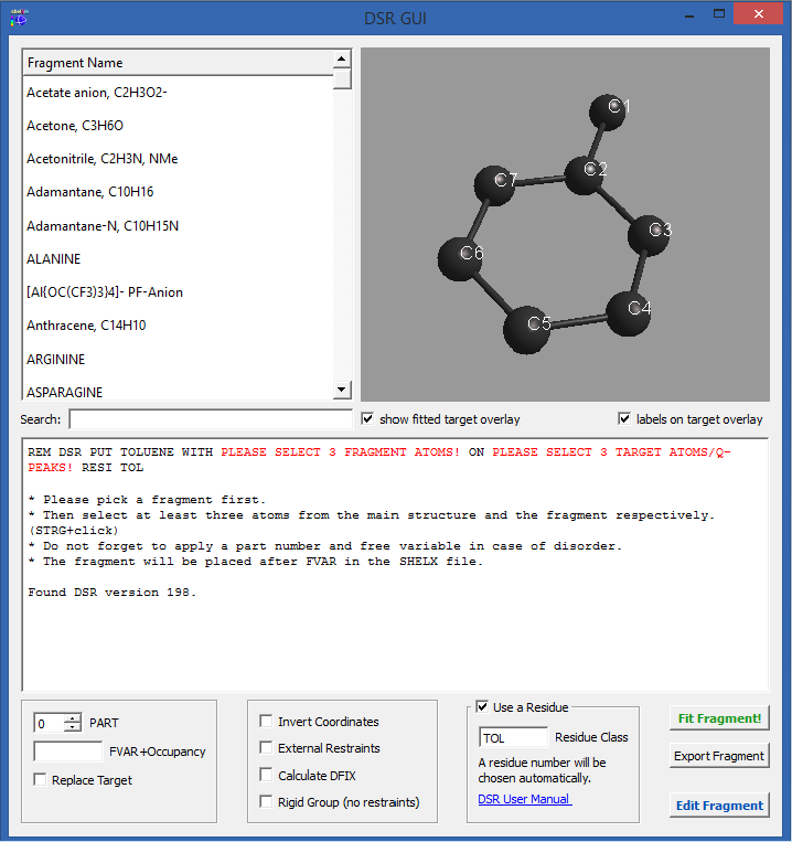 GUI von DSR in ShelXle